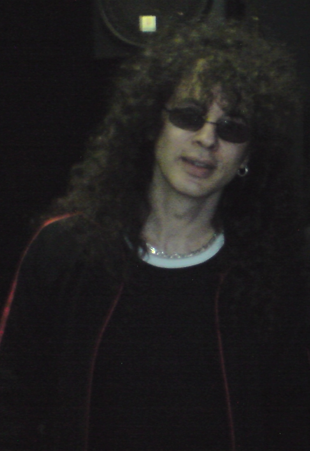 Patrick Rondat